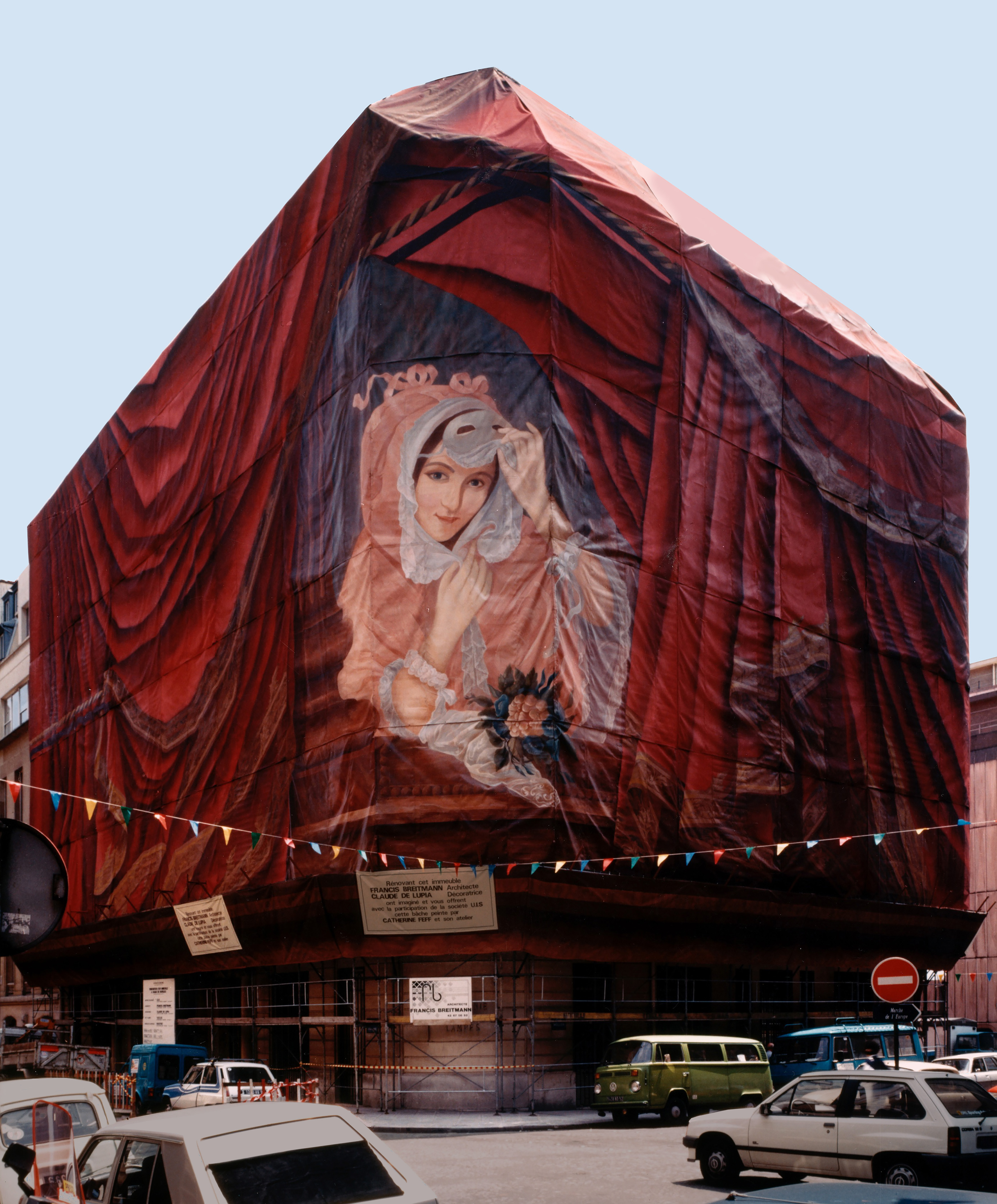 Tout a été peint à la main, à Issy-les-Moulineaux en avril et mai 1986. C’est la première toile peinte figurative tendue sur un échafaudage à Paris. L’idée consistant à s’appuyer sur les structures dressées dans le cadre de travaux et d’utiliser des bâches ordinaires de chantier pour peindre des décors.